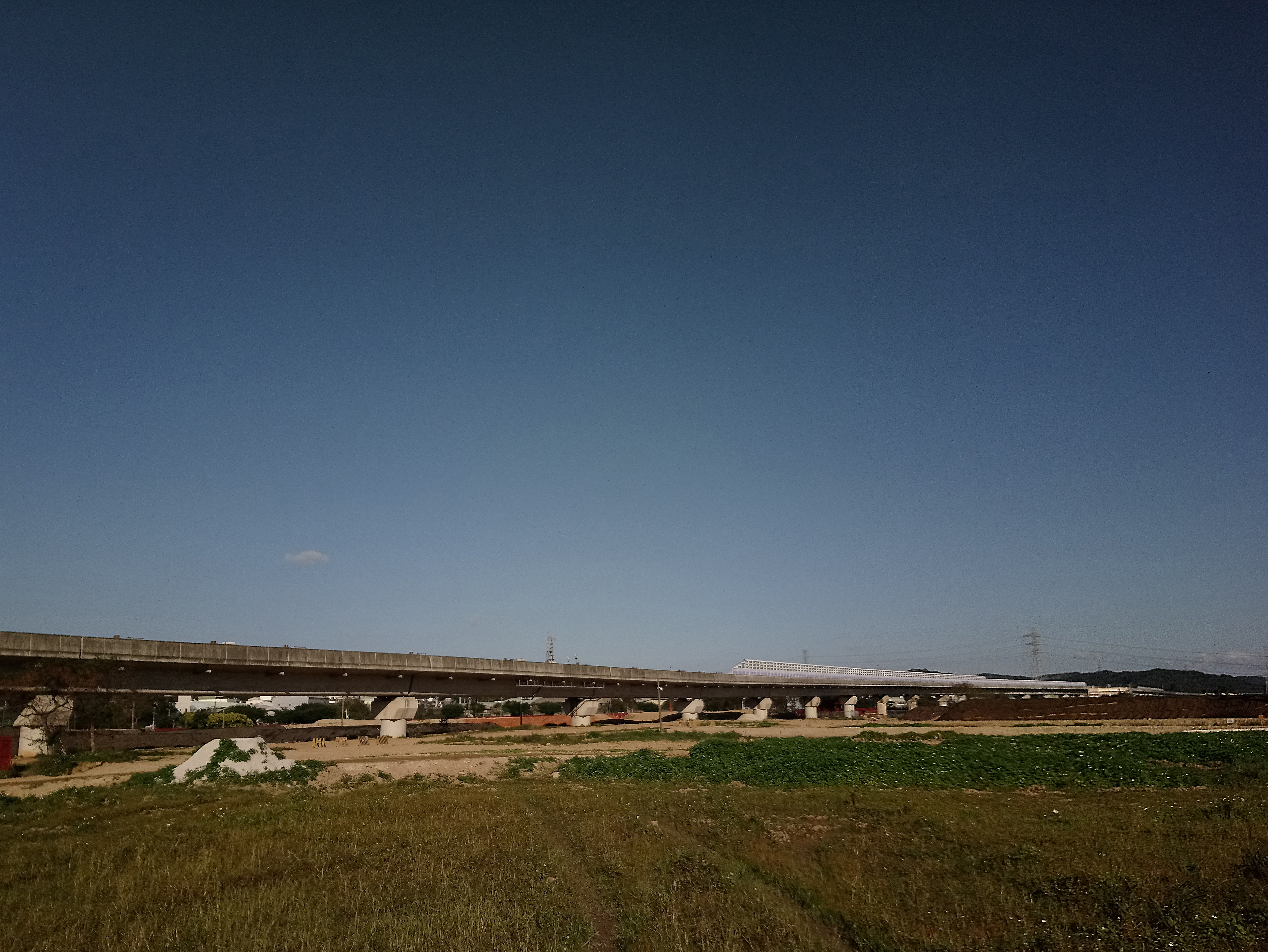 山鼻站～林口站間的桃園捷運機場線,桃園市蘆竹區南崁地區山鼻里